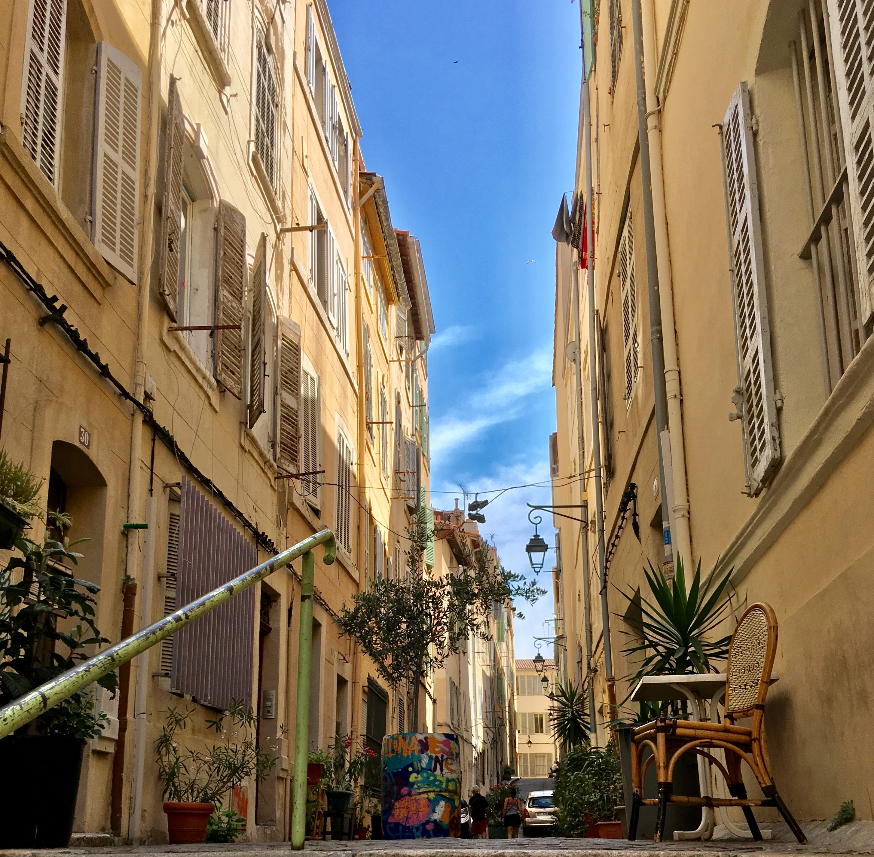 Rue Sainte Françoise au Panier à Marseille